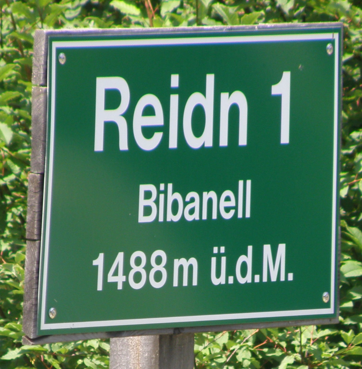 Nockalmstrasse - označení zatáček